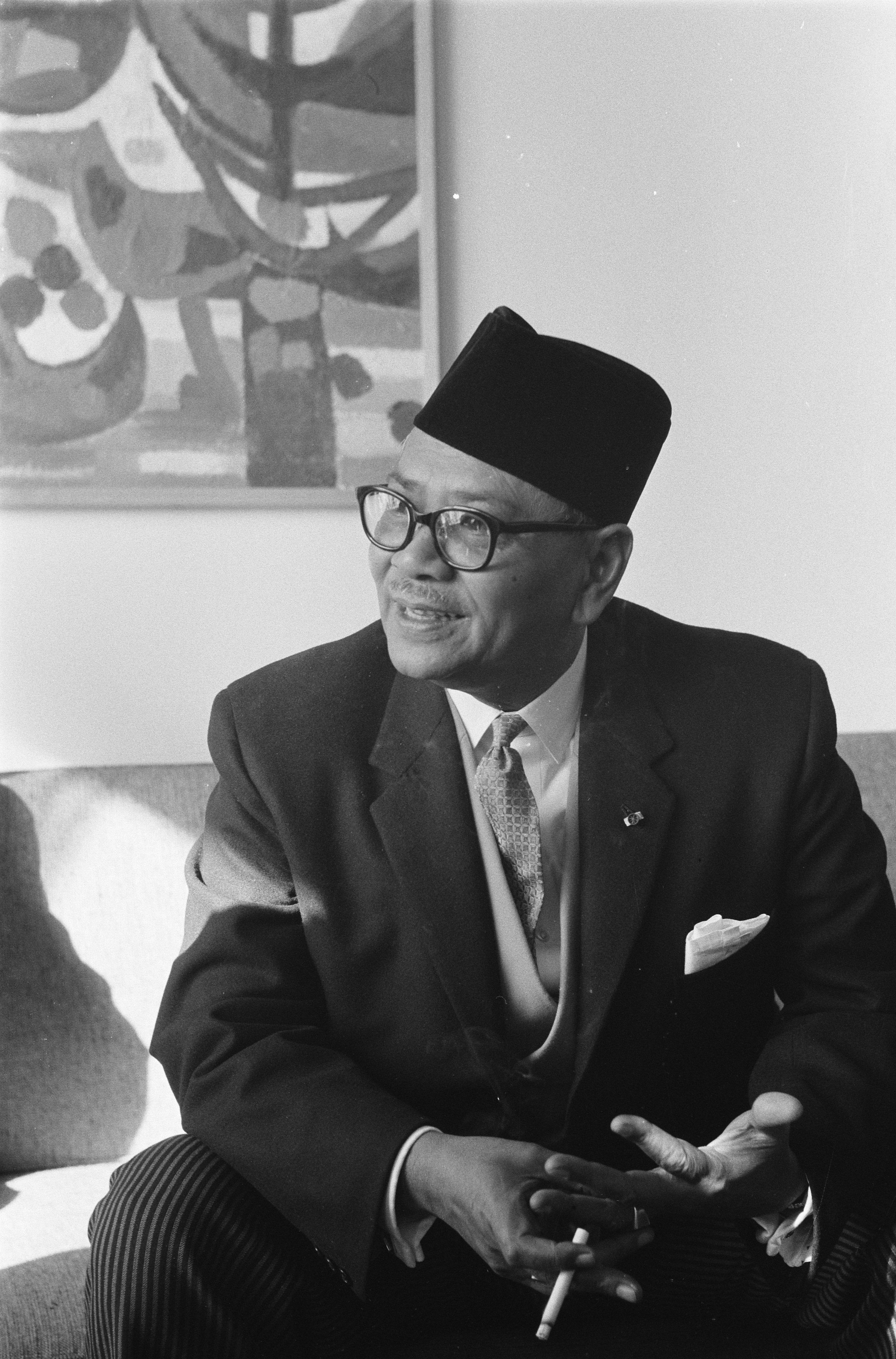 Collectie / Archief : Fotocollectie Anefo Reportage / Serie : [ onbekend ] Beschrijving : Aankomst van premier van Malakka Abdul Rahman Datum : 26 mei 1960 Locatie : Malakka, Maleisië Trefwoorden : aankomsten, premiers Persoonsnaam : Abdul Rahman Fotograaf : Pot, Harry / Anefo Auteursrechthebbende : Nationaal Archief Materiaalsoort : Negatief (zwart/wit) Nummer archiefinventaris : bekijk toegang 2.24.01.05 Bestanddeelnummer : 911-2803